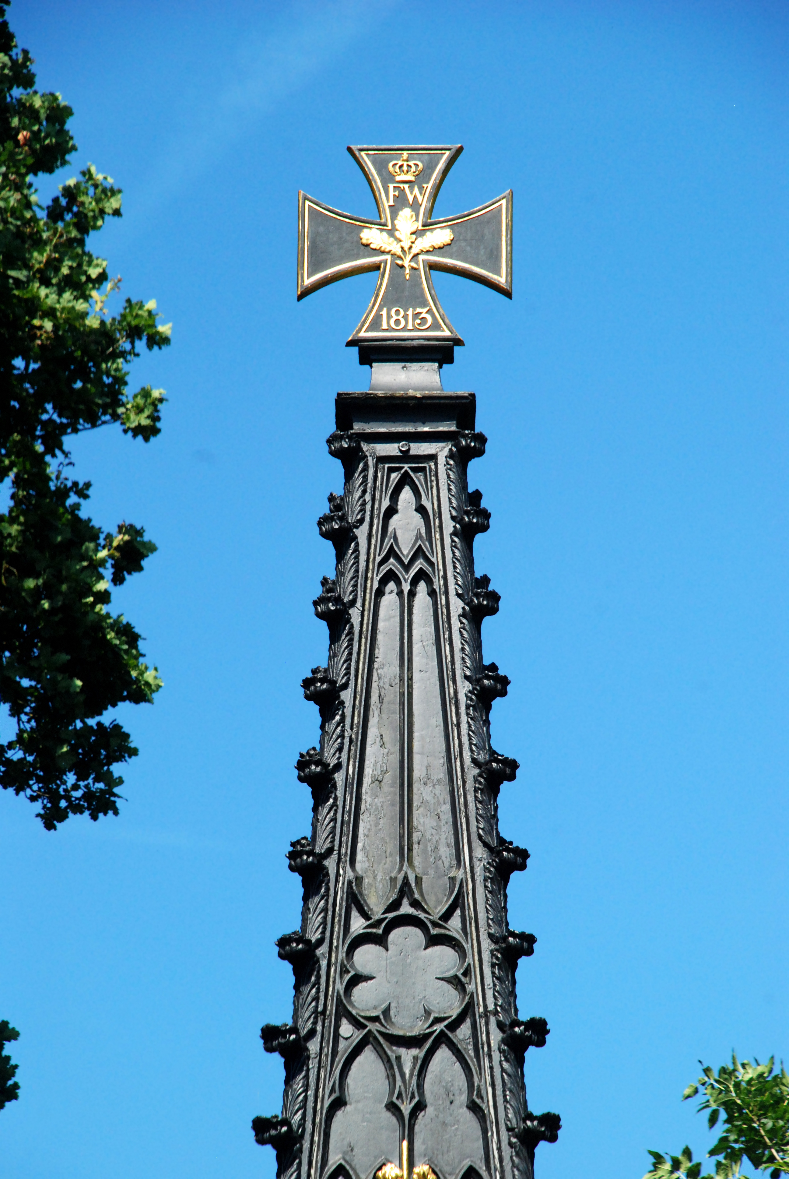 Belgique - Brabant wallon - Lasne - Monument prussien